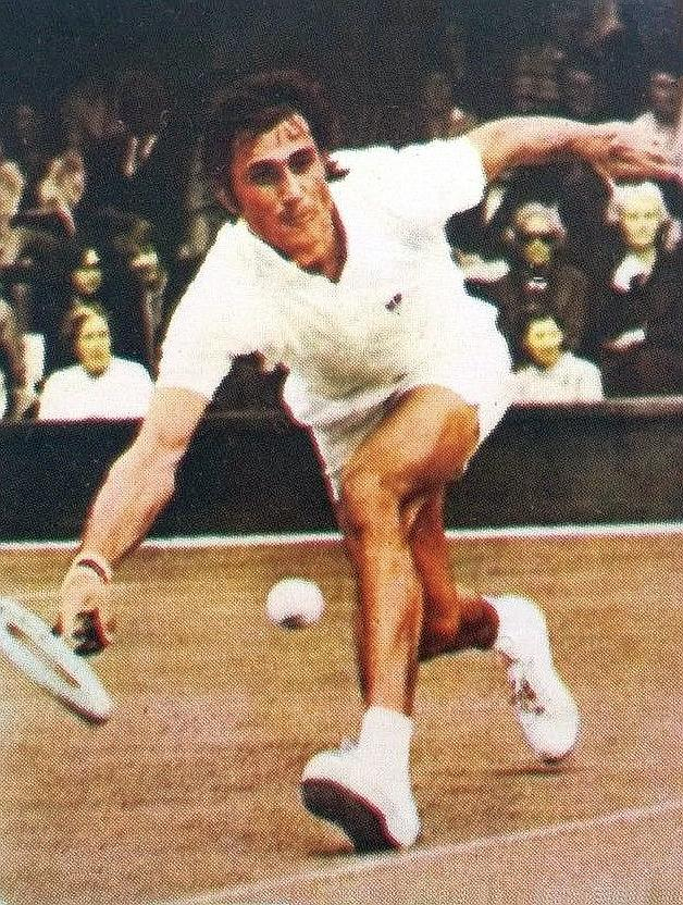 Elie Nastase, 'Campioni Dello Sport' Panini 1973 - 1974, n°360